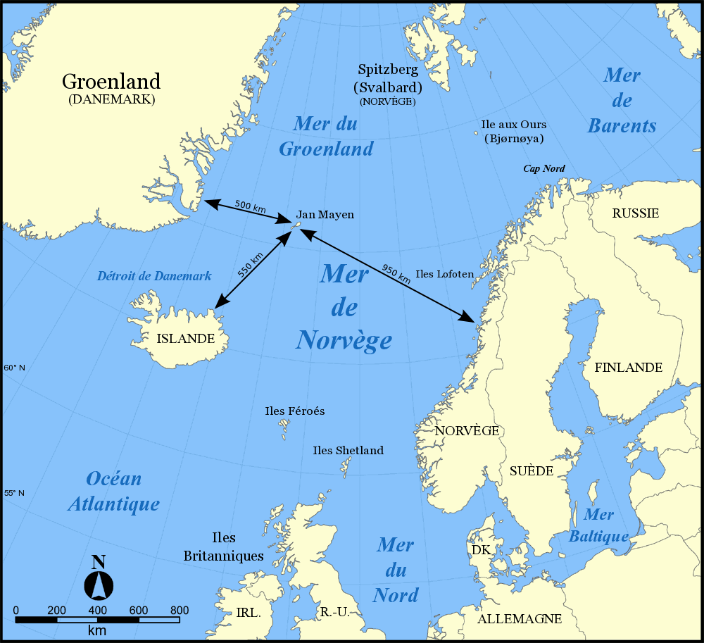 Carte de la mer de Norvège avec les distances entre Jan Mayen et les continents alentour.